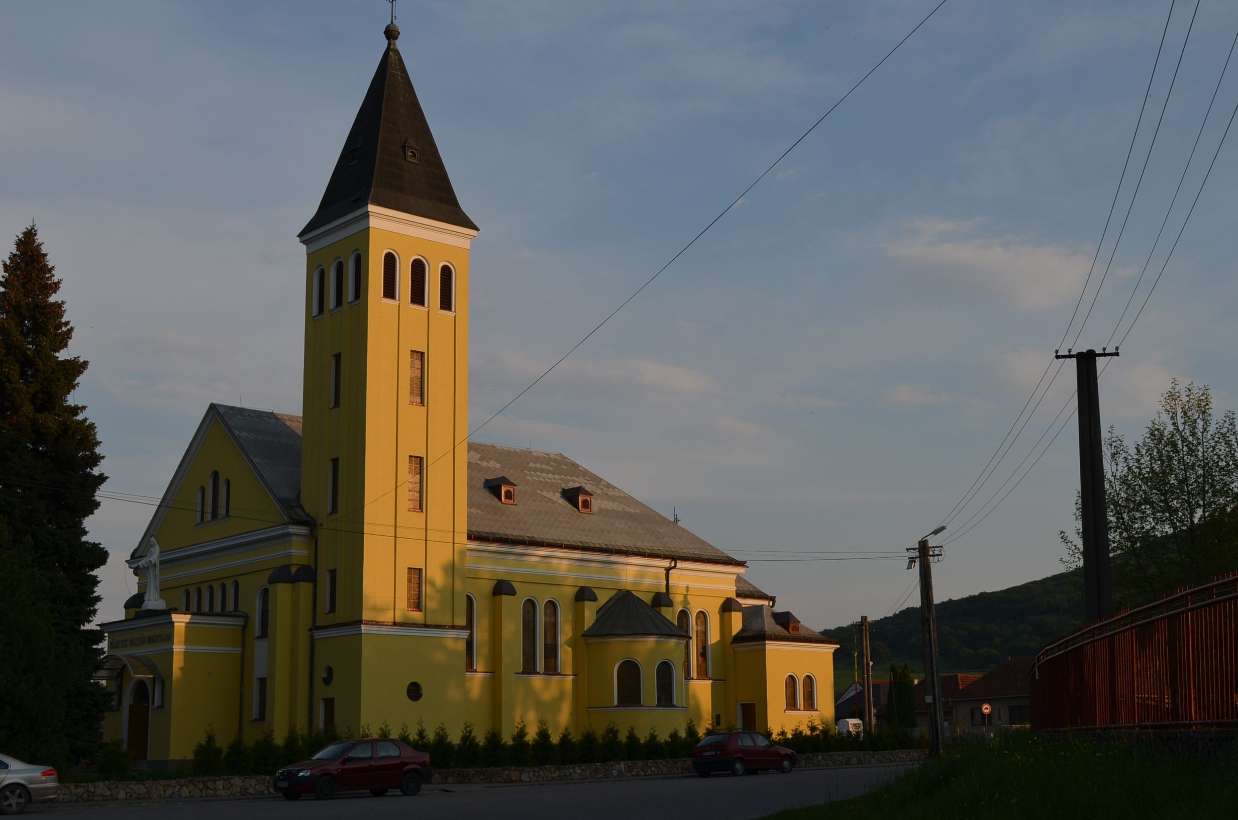 Zsére